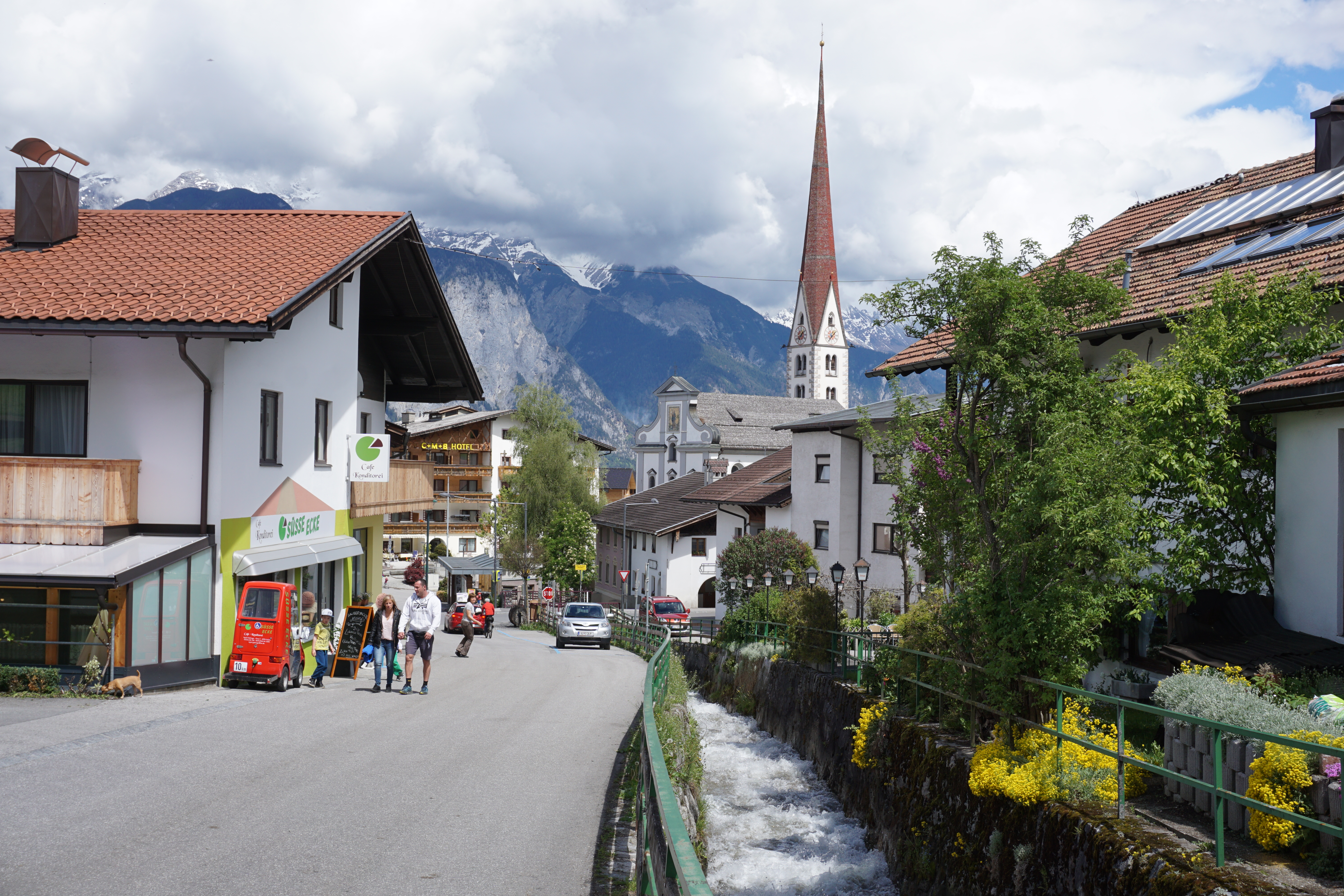 Axamer Bach südlich des Axamer Dorfplatzes in Gries